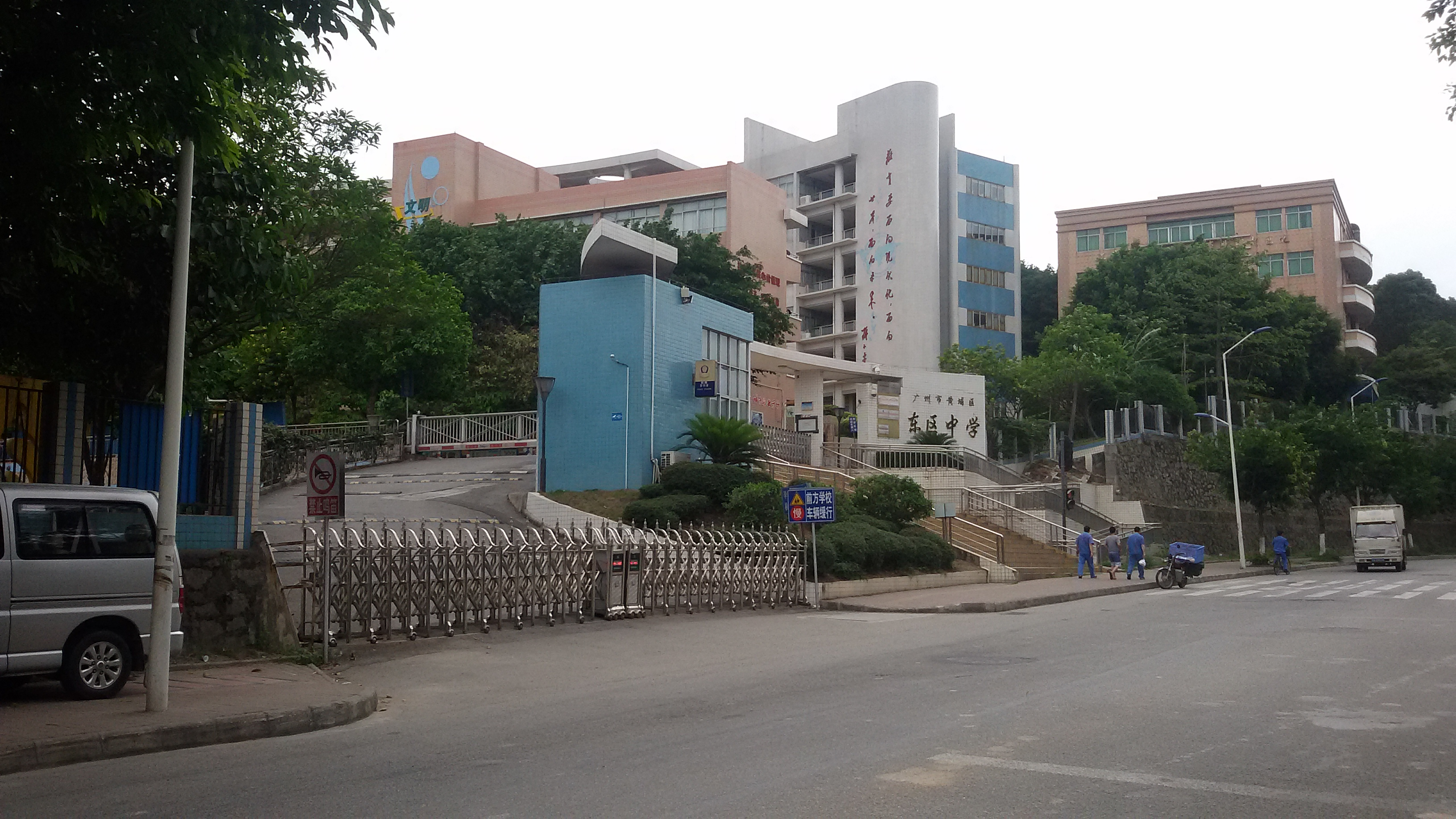 粵語: 黃埔東區中學嘅正門